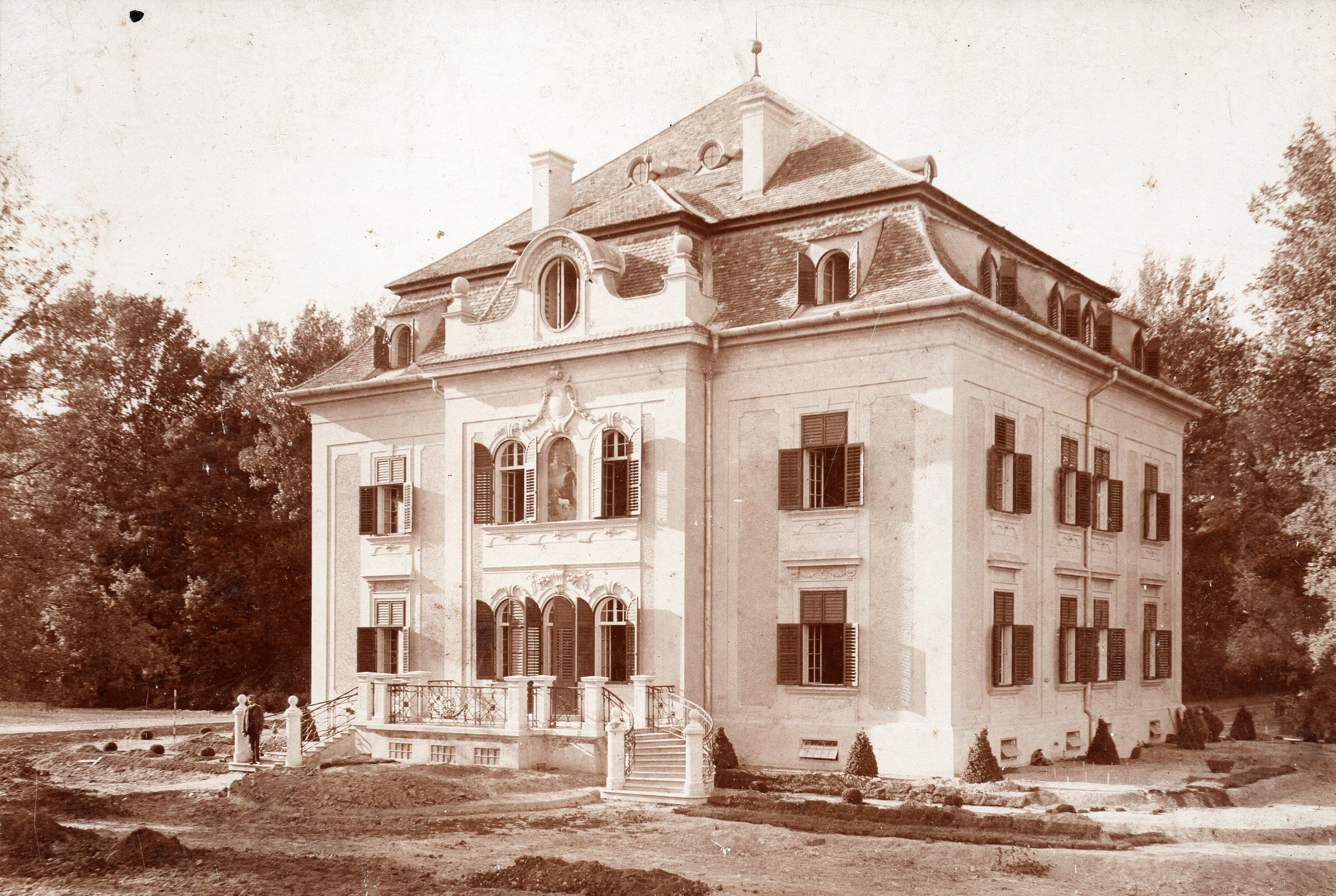 Frigyes főherceg Karapancsai vadászkastélya. Location: Hungary, Hercegszántó Tags: castle Title: Frigyes főherceg Karapancsai vadászkastélya.